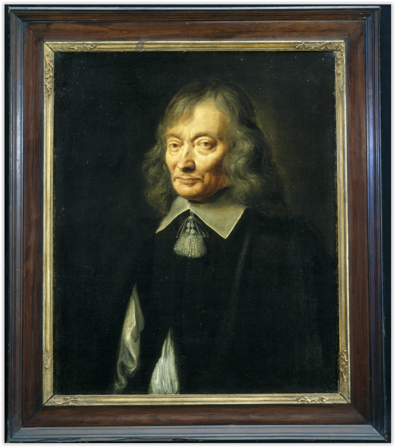 Claudius Salmasius (1588-1653) - Johannes de Vos IV. 1650-1660. Halffiguur in driekwart naar links. Gesigneerd: J D Vos F Ao 16(5). In een donkere houten geprofileerde lijst met op de hoeken van de vergulde binnenlijst bladdecoratie. Verwerving 1743 : schenking Gerard van Papenbroeck. Inventarisnummer 000.039 Universiteit van Amsterdam.